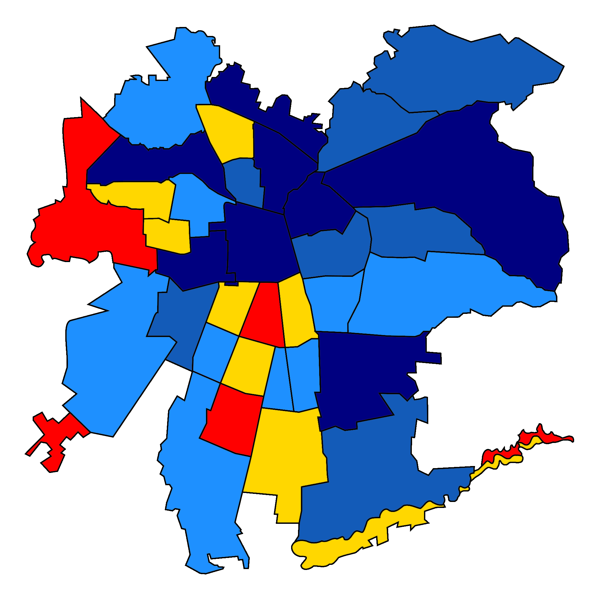 Resultado de las elecciones de alcaldes de 2012 en las comunas del Gran Santiago PCCh PS PPD PDC RN UDI